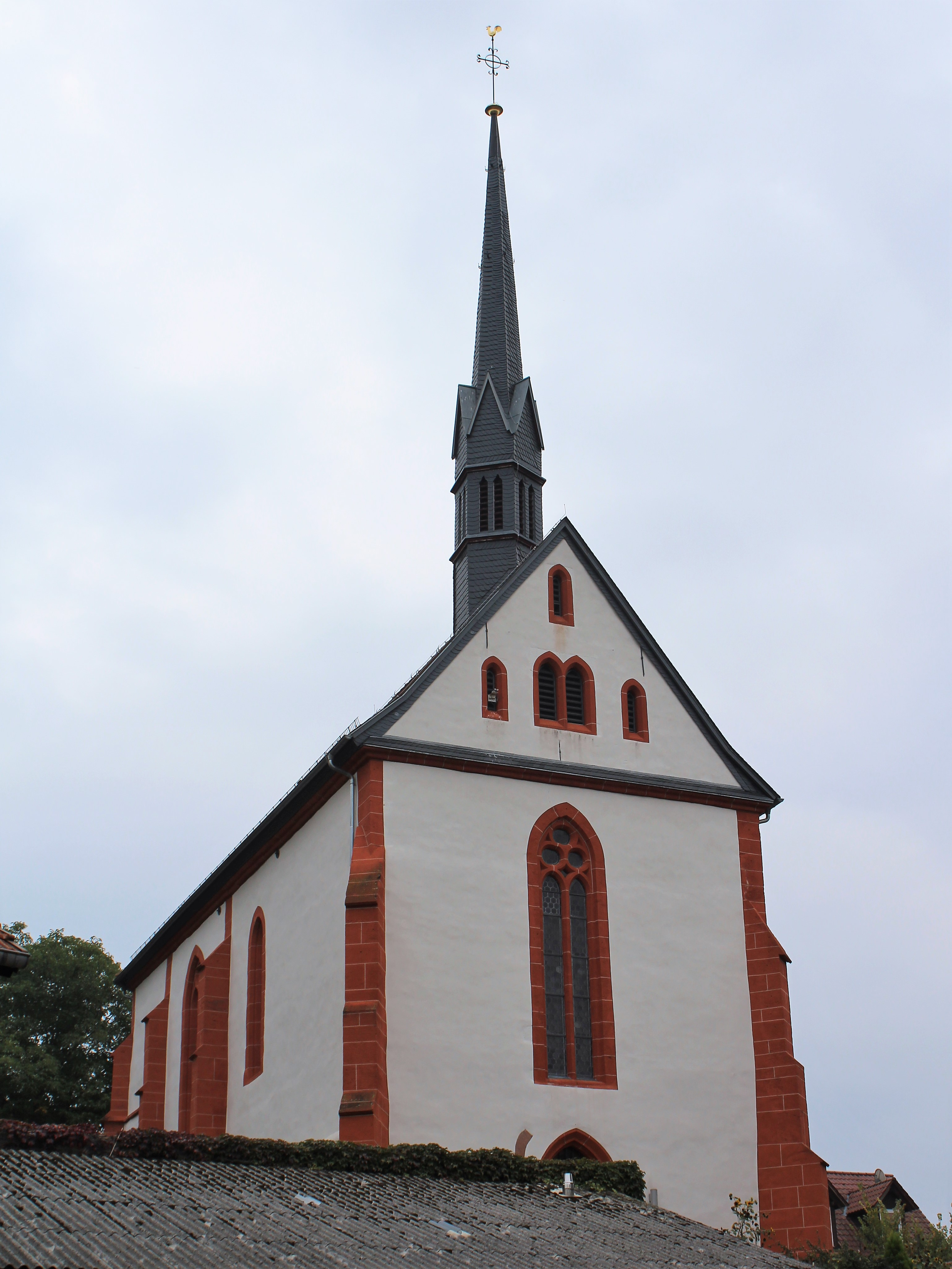 Evanglische Kirche Rüdigheim (Neuberg), Main-Kinzig-Kreis, Hessen, Deutschland